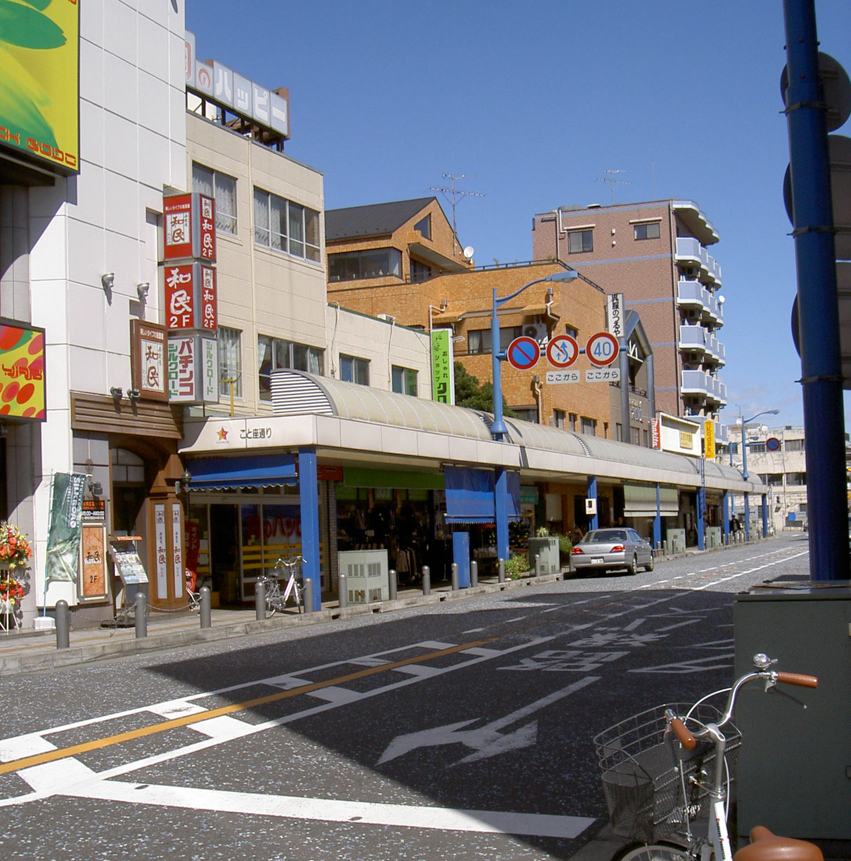 Kanagawa Prefectural Road Route 502 ja: 神奈川県道502号淵野辺停車場線